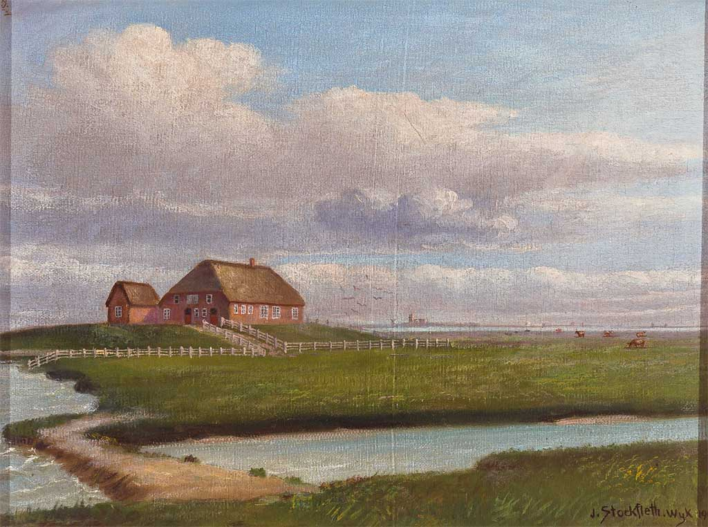 Hallig Langeneß Peterswerft (= Peterswarf) nach rückseitiger Betitelung, Öl auf Leinwand, 21 x 28 cm. Signiert und 1919 datiert.